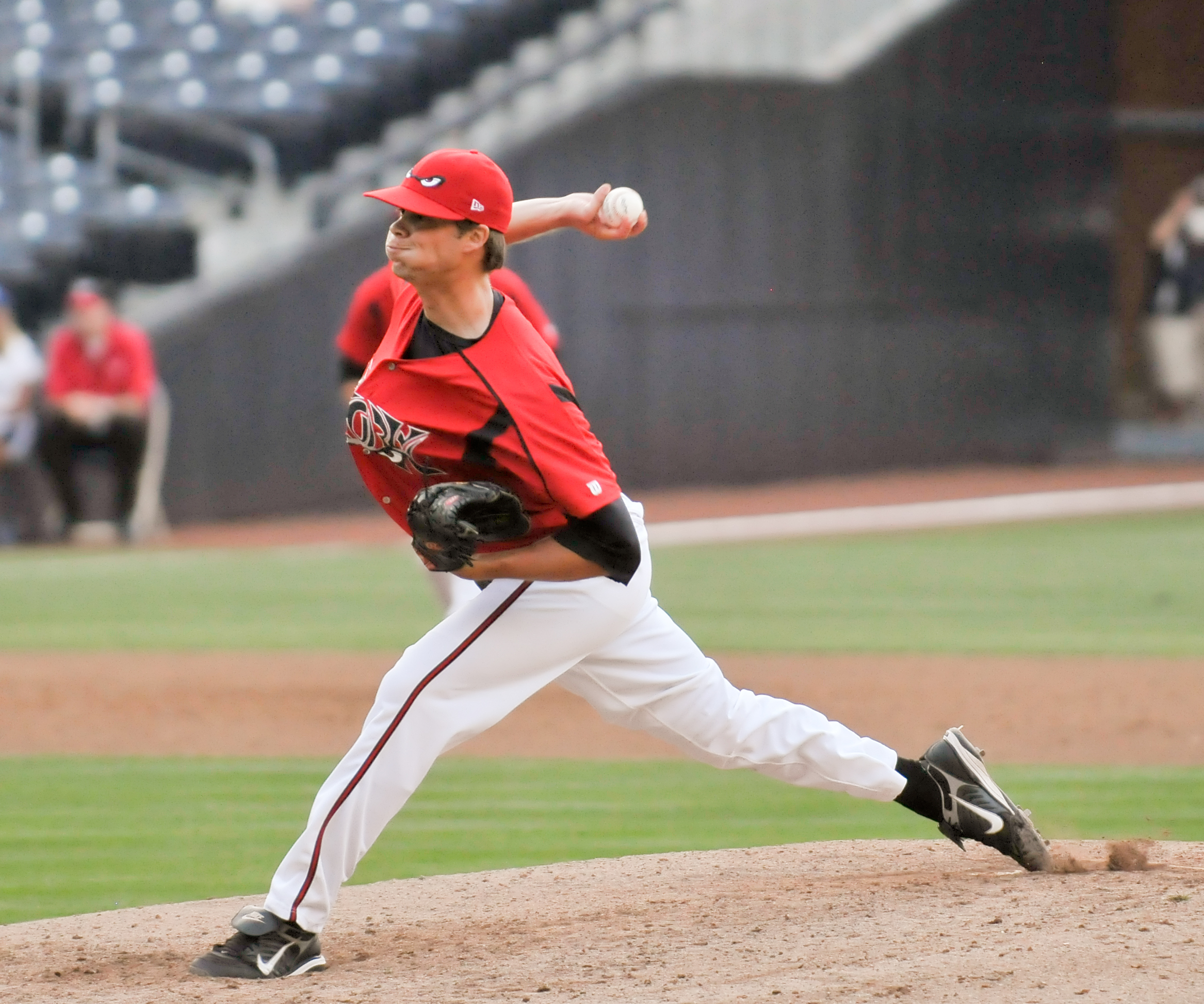 Evan Scribner